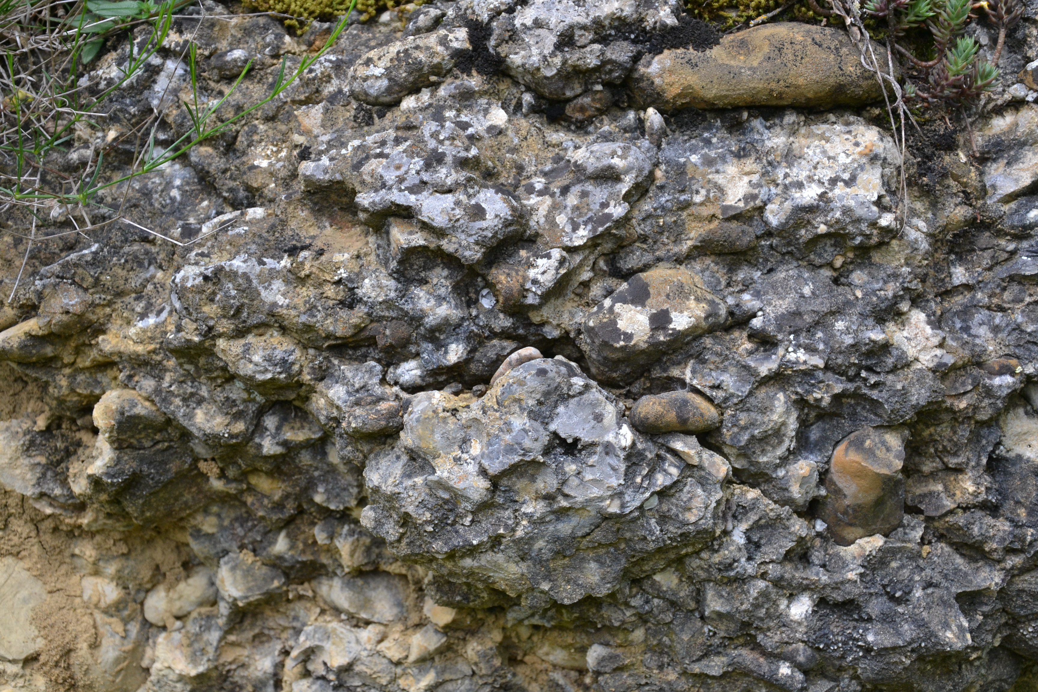 Affleurements de poudingue entre Besset et Coutens (Ariège, France).